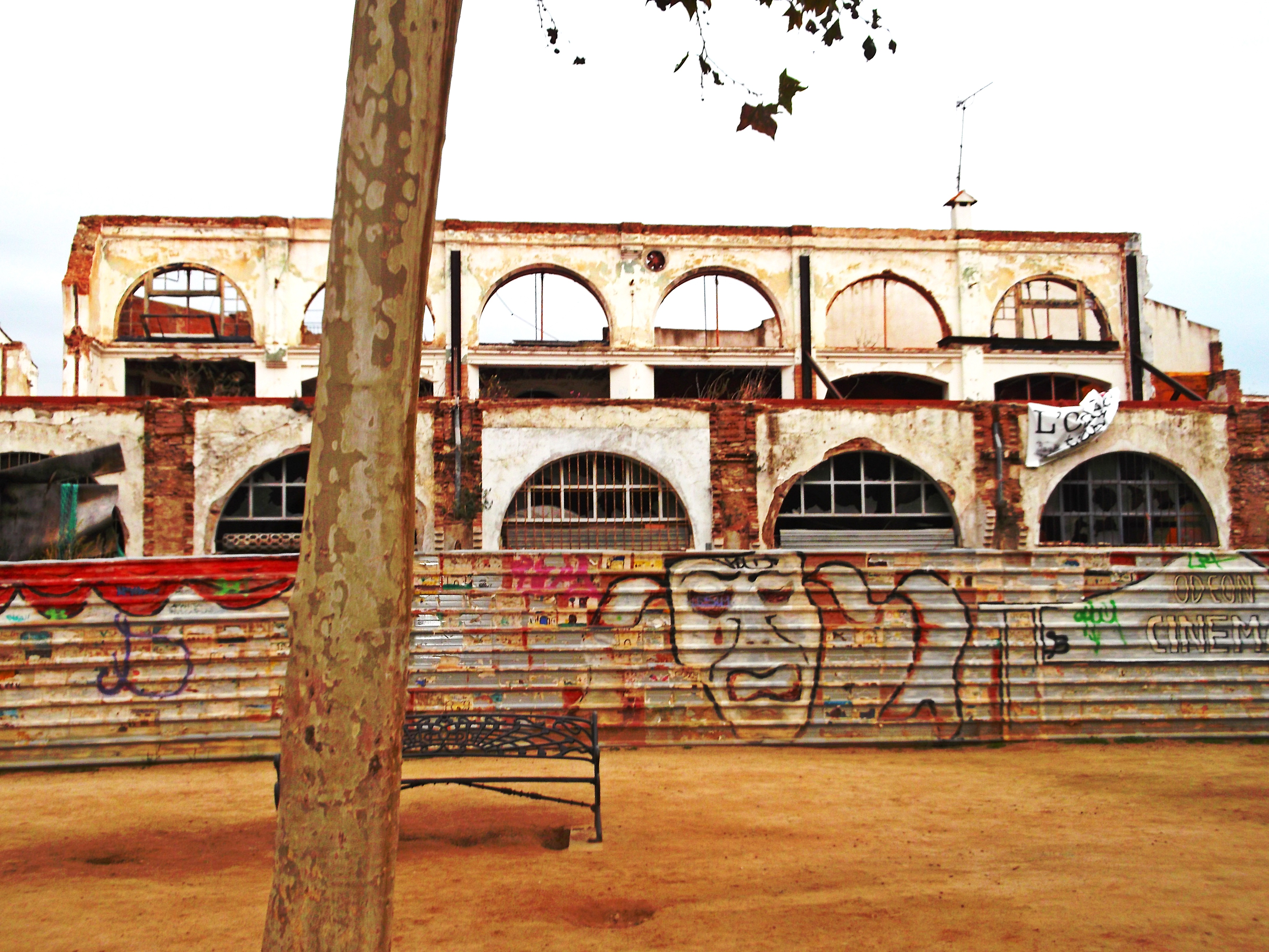 L'odèon, arruïnat...